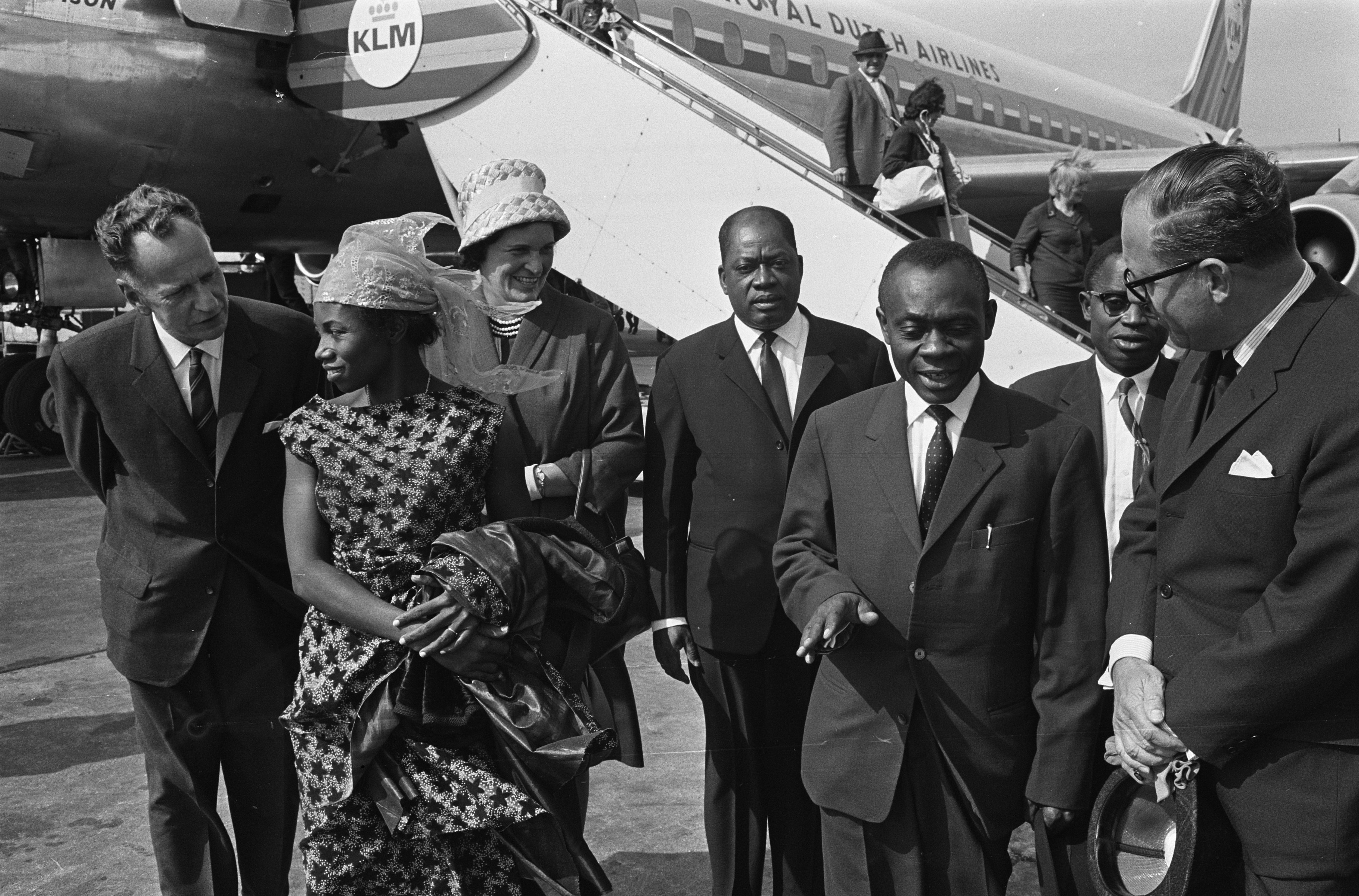 Collectie / Archief : Fotocollectie Anefo Reportage / Serie : [ onbekend ] Beschrijving : Aankomst van vice president van Kameroen J. Foncha op Schiphol, nr. 4 J. Foncha (kop) Datum : 19 mei 1964 Locatie : Noord-Holland, Schiphol Trefwoorden : aankomsten, vice-presidenten Persoonsnaam : J. Foncha Fotograaf : Pot, Harry / Anefo Auteursrechthebbende : Nationaal Archief Materiaalsoort : Negatief (zwart/wit) Nummer archiefinventaris : bekijk toegang 2.24.01.05 Bestanddeelnummer : 916-4474